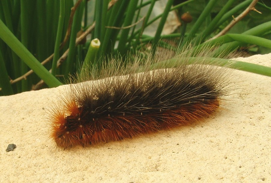 Arctia caja photo by Jeffdelonge, Vantoux et Longevelle, France, mai 2006